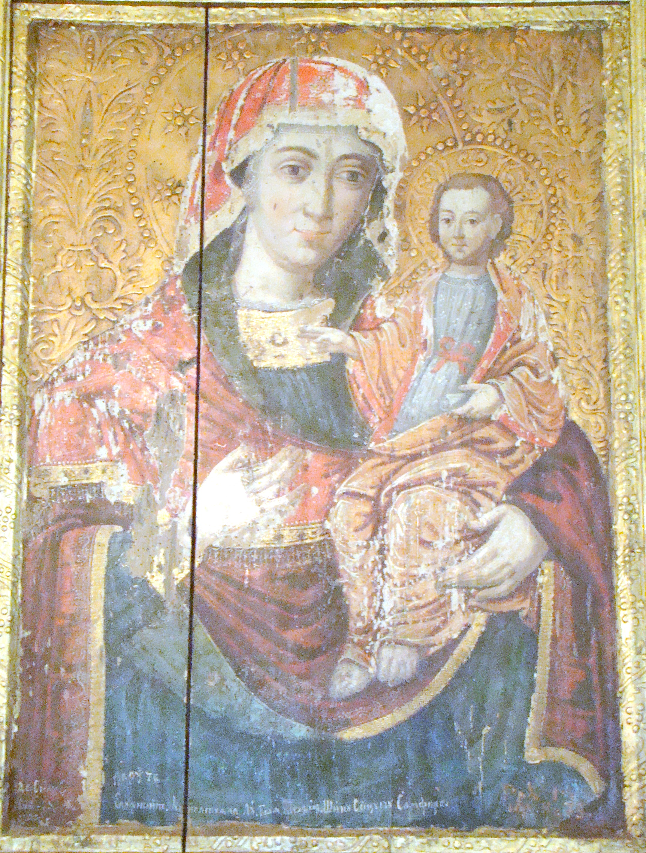 Biserica „Sf. Arhangheli”, sat Vidra; comuna Vidra